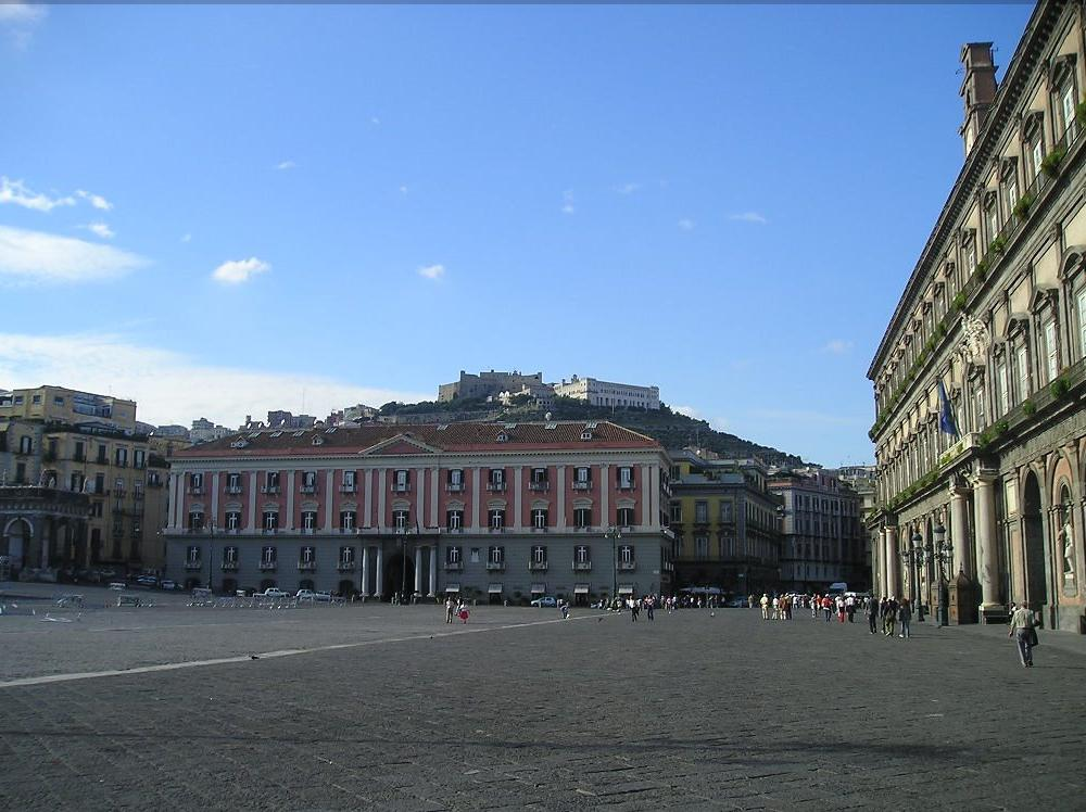 Sant'Elmo da Piazza del Plebiscito. Senza Zoom